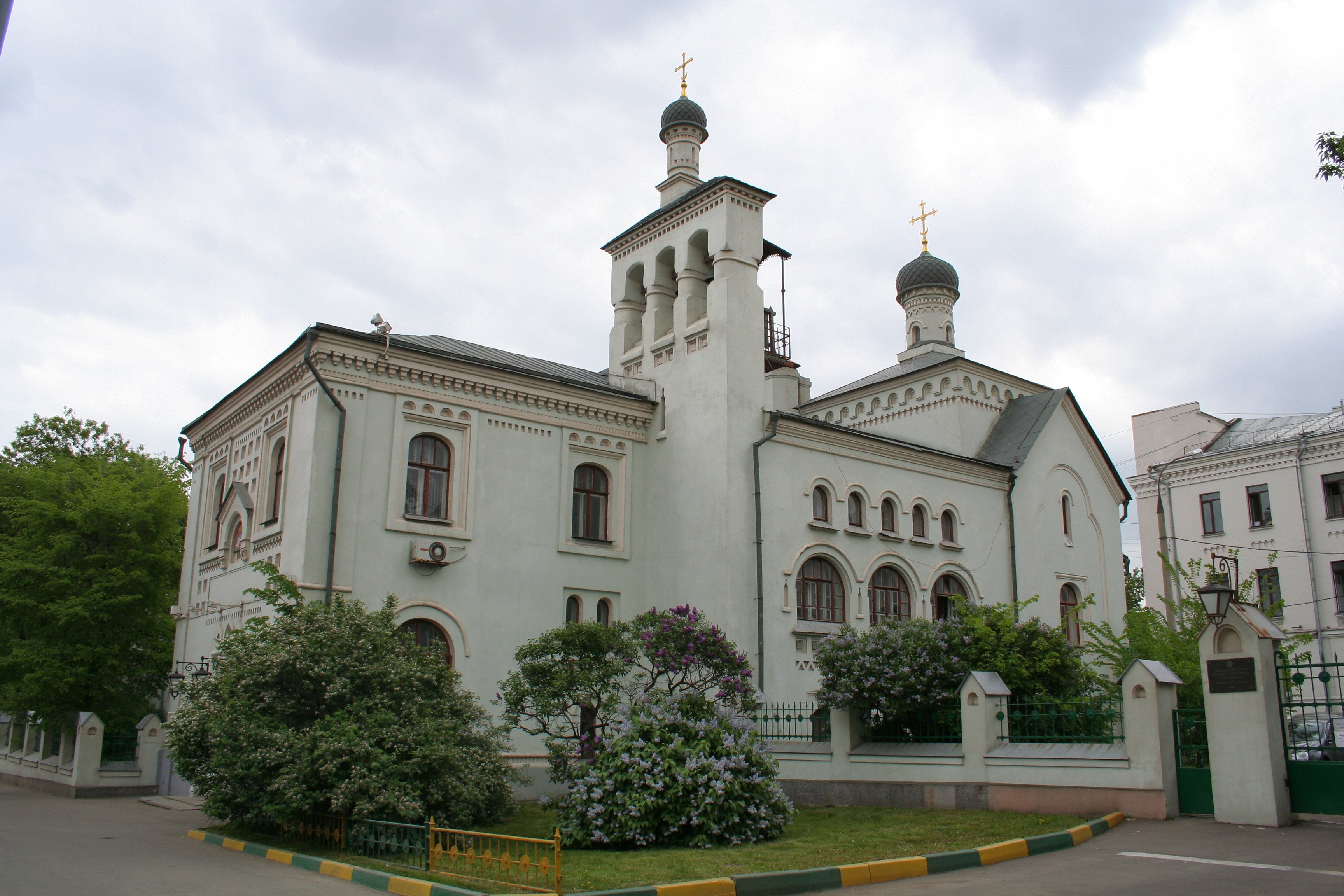 Kirche der Gottesmutter-Ikone von Tichwin bei der Zentralklinik des Moskauer Patriarchats, Moskau